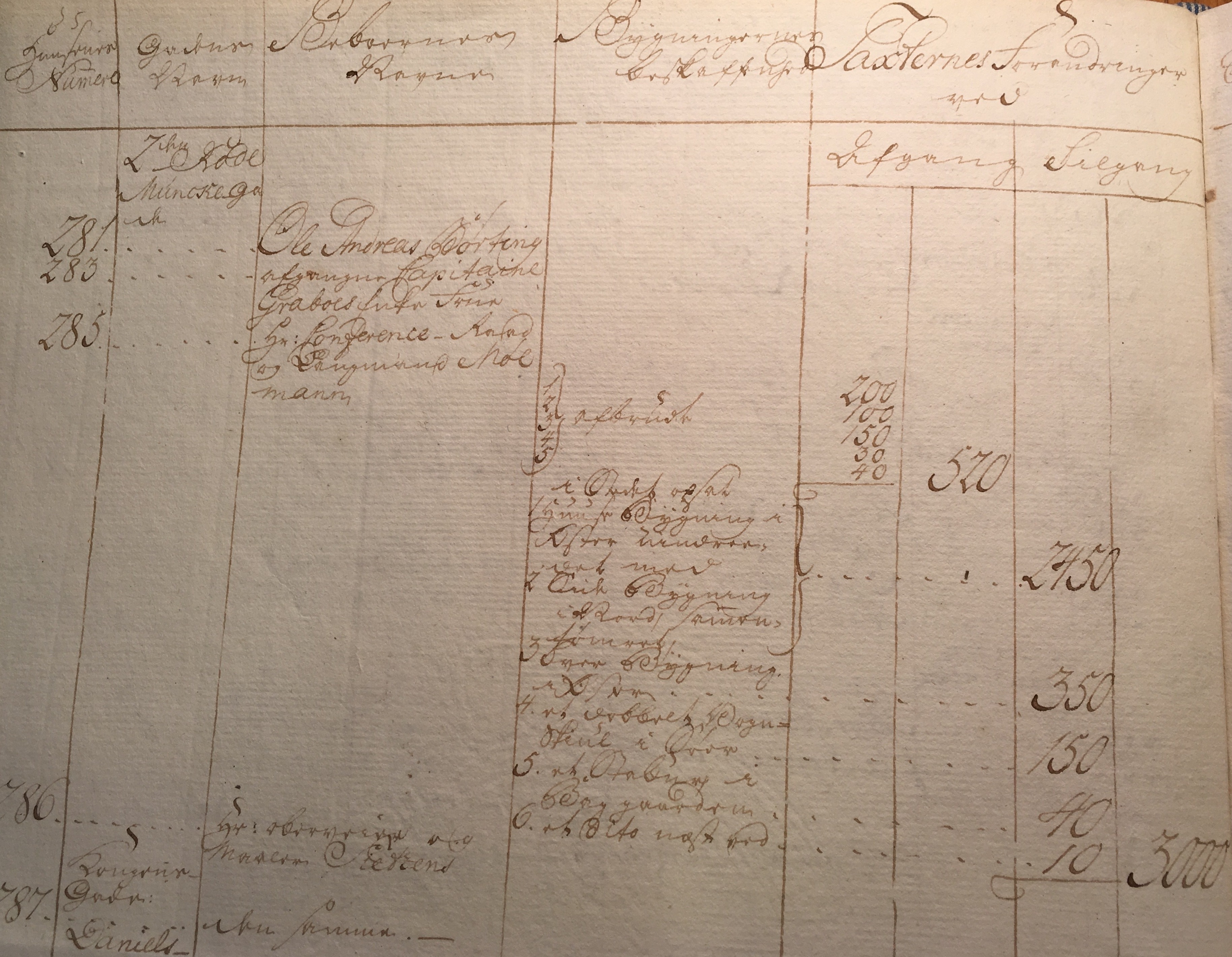 Protokoll fra første branntakstforretning for Mølmanns palé, bygningen Harmonien i Trondheim, fra 1770